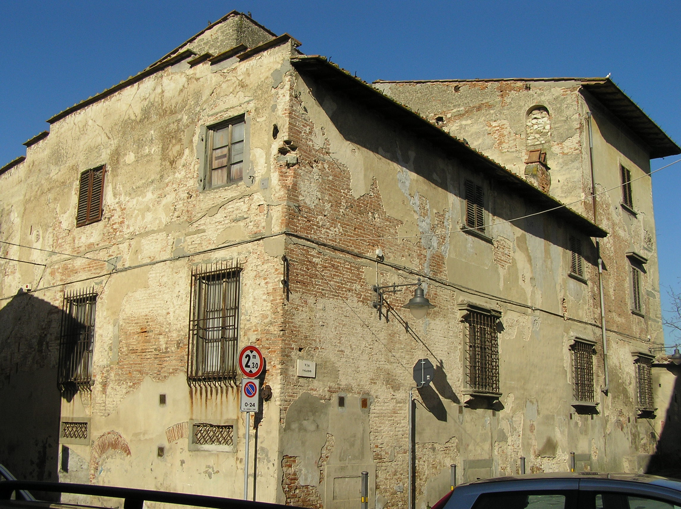 Capalle, il Palagio, edificio del vescovo